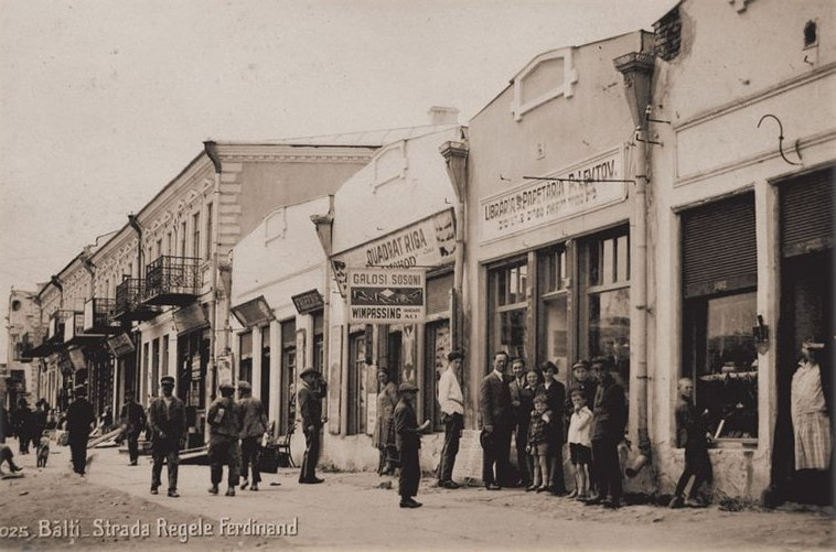 Straga Regele Ferdinand din Bălţi, în prezent str. Independenţei